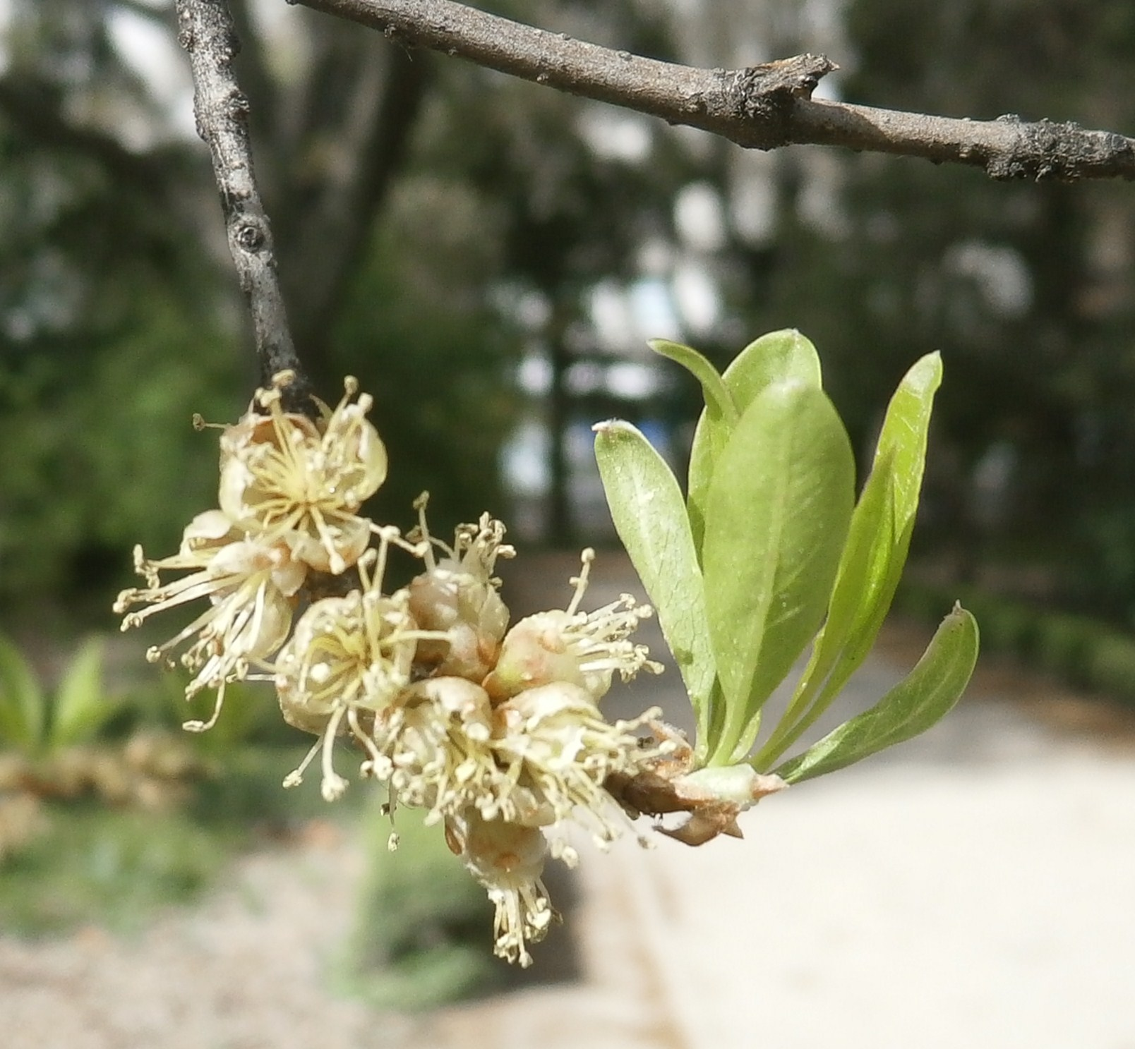 Brotes de primavera